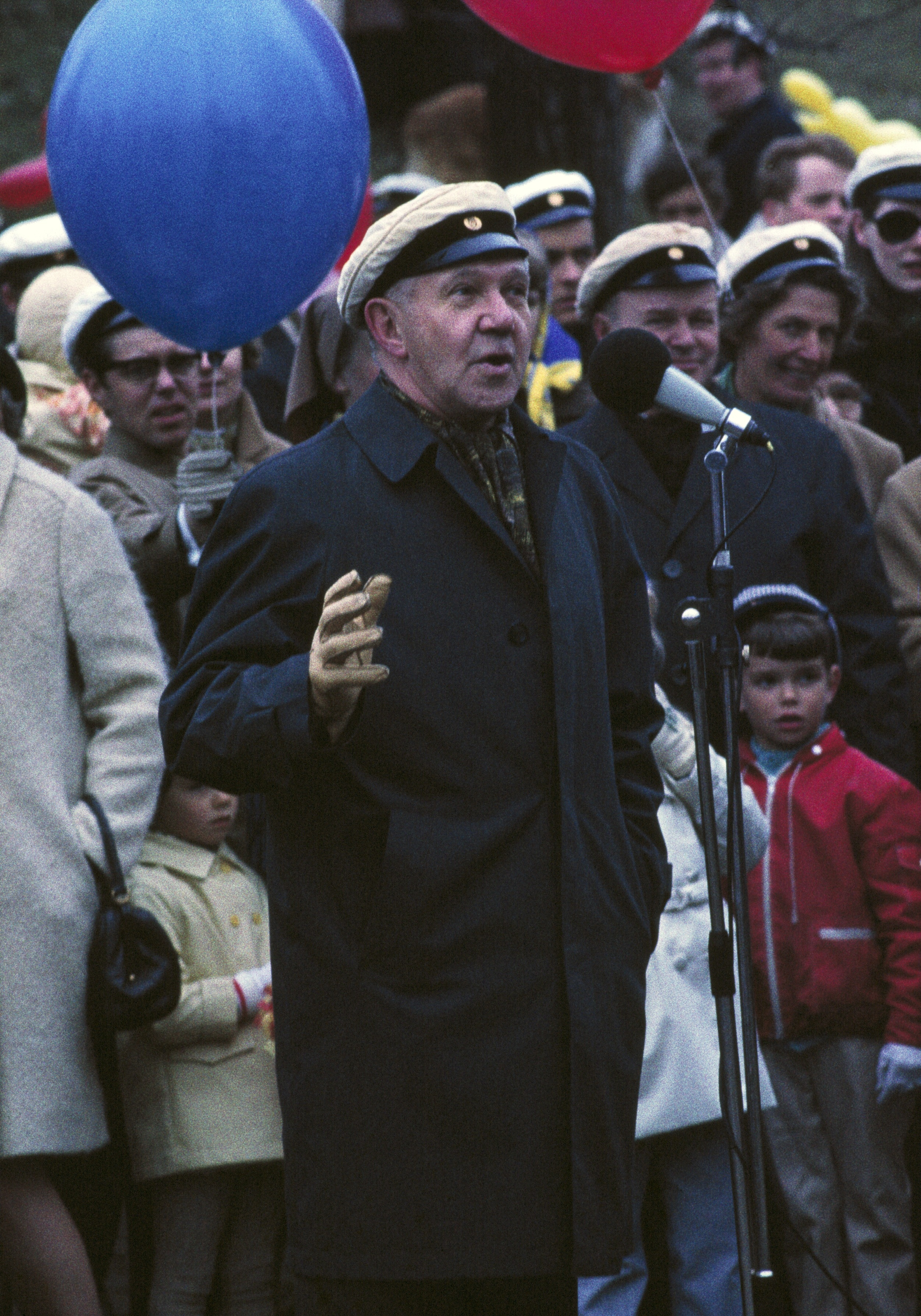 Toimittaja Enzio Sevón (1906–1998) puhuu Kaisaniemessä vappuna 1968.